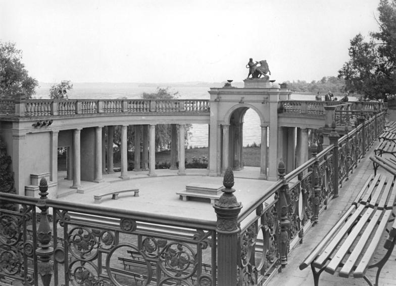 Schwerin, Schloss, Burghof Zentralbild Krüger 12.10.1964 Blick auf den Burghof des Schweriner Schlosses.